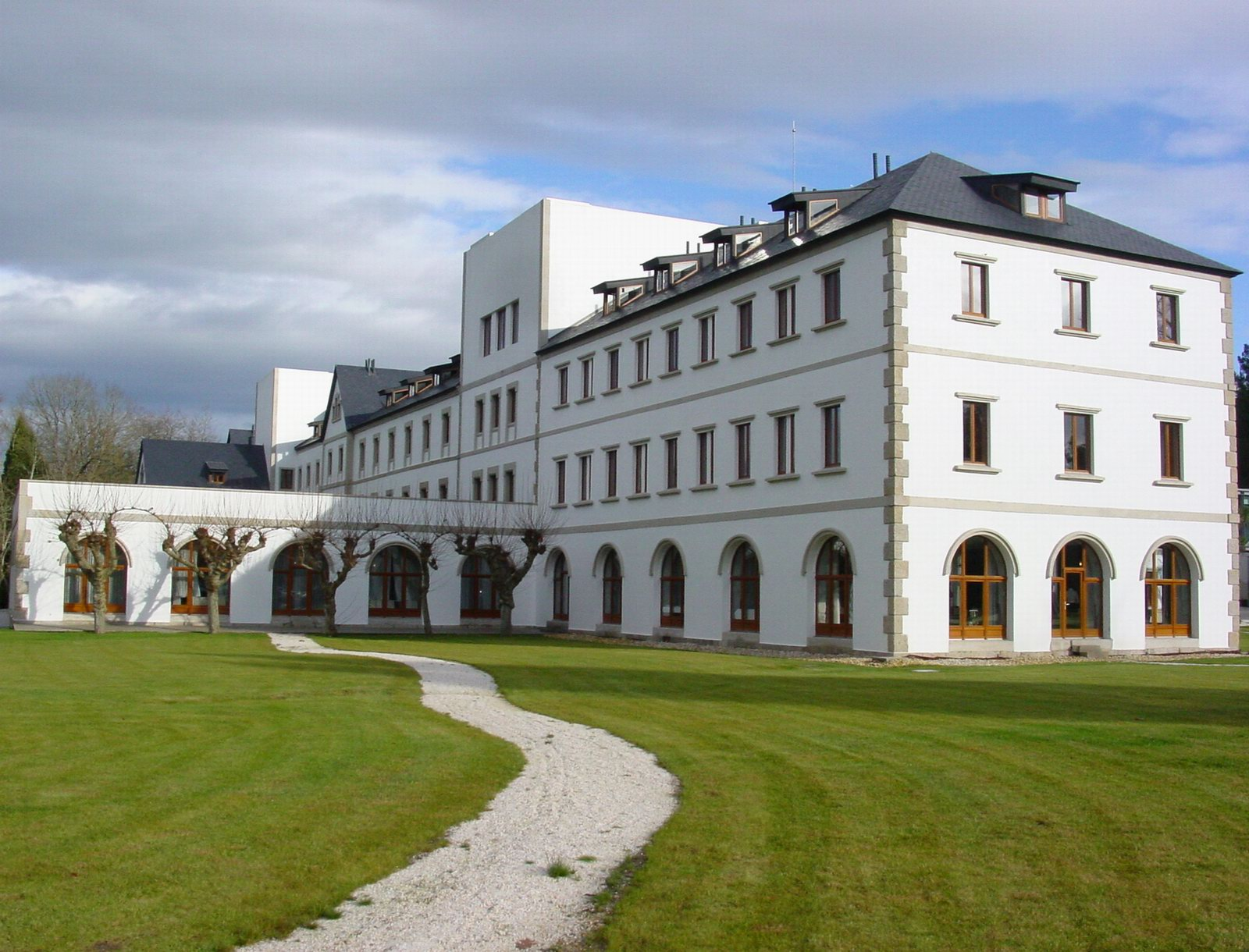 Image:Guitiriz - Balneario 031207 018.jpg